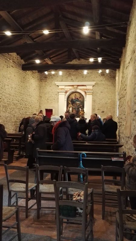 Festa di San Biagio a Cittiglio con distribuzione del pane benedetto - domenica 5 febbraio 2017